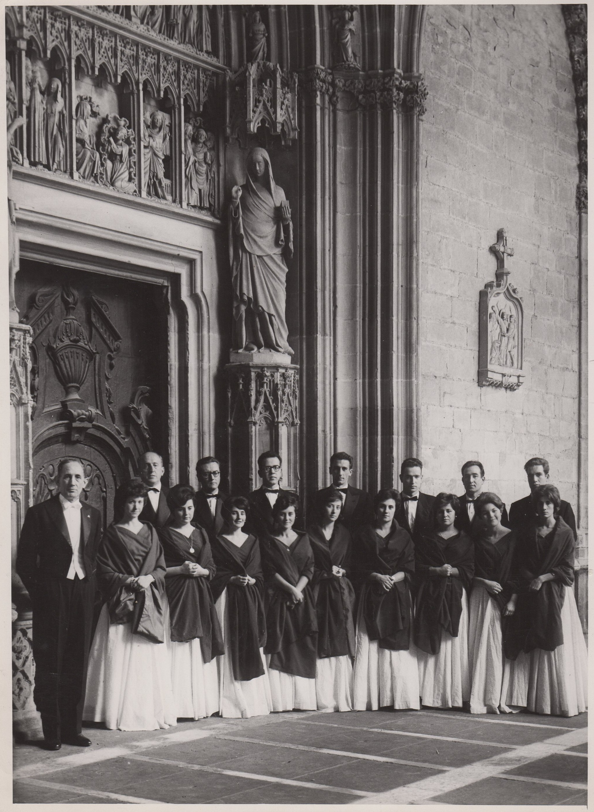 La Coral, junto a su director Luis Morondo, en una foto oficial en la Catedral de Pamplona en la década de los años 50